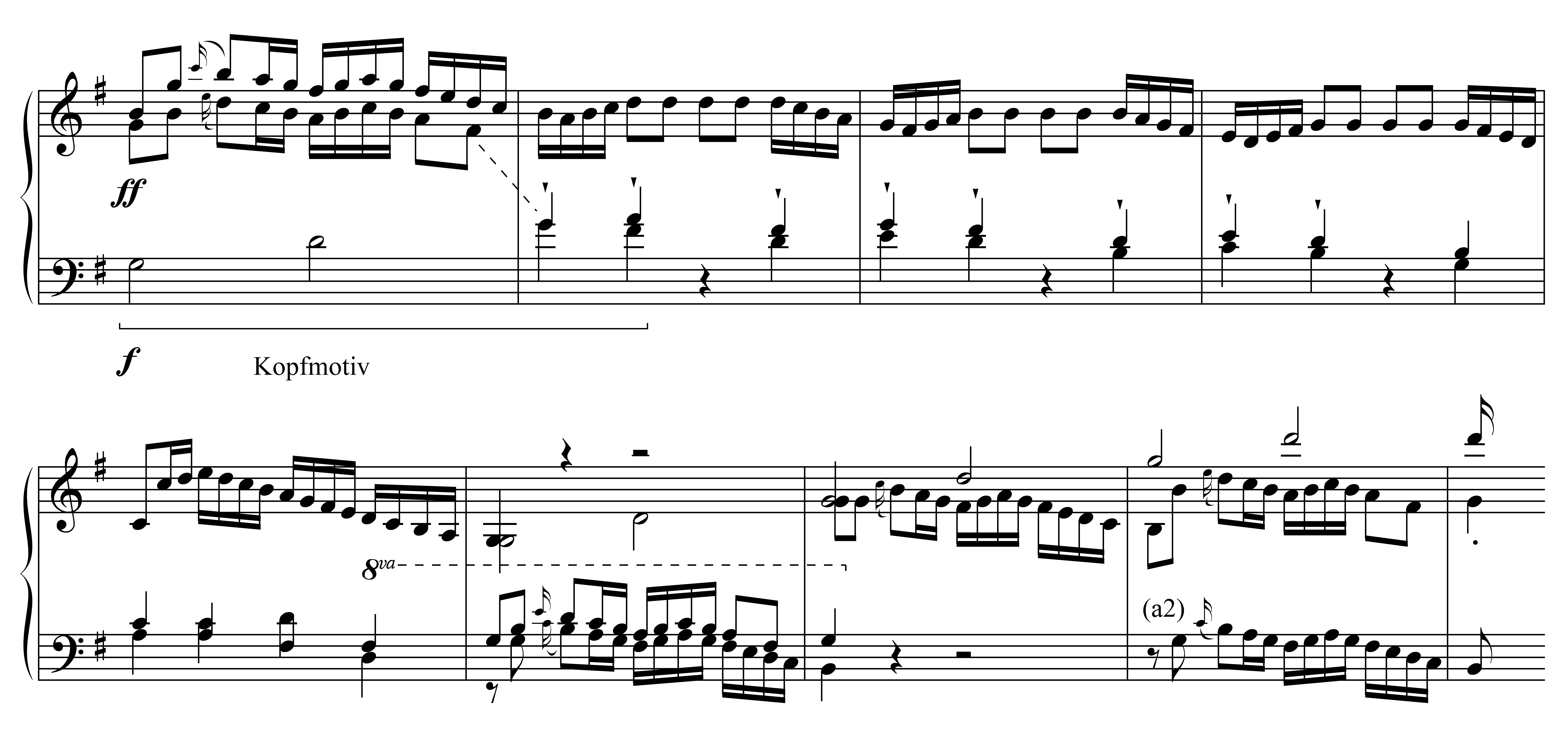 Notenbeispiel Haydn Sinfonie 44 - 1.Satz, Seitensatz (Exposition) T. 20-28